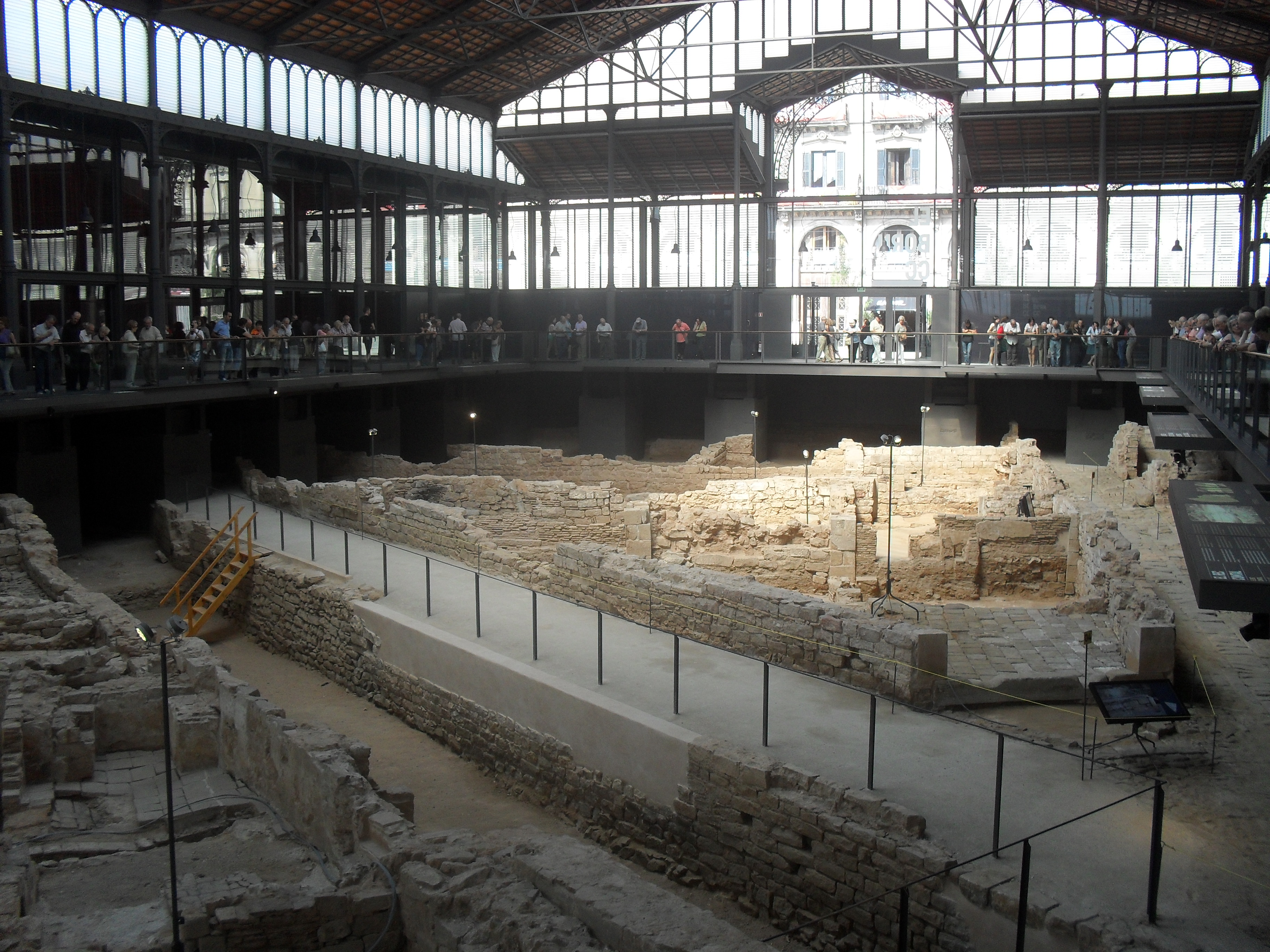 antigua destileria de 1714,debajo del mercado del born - barcelona